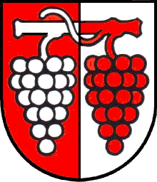 Wappen der politischen Gemeinde Maisprach, Schweiz